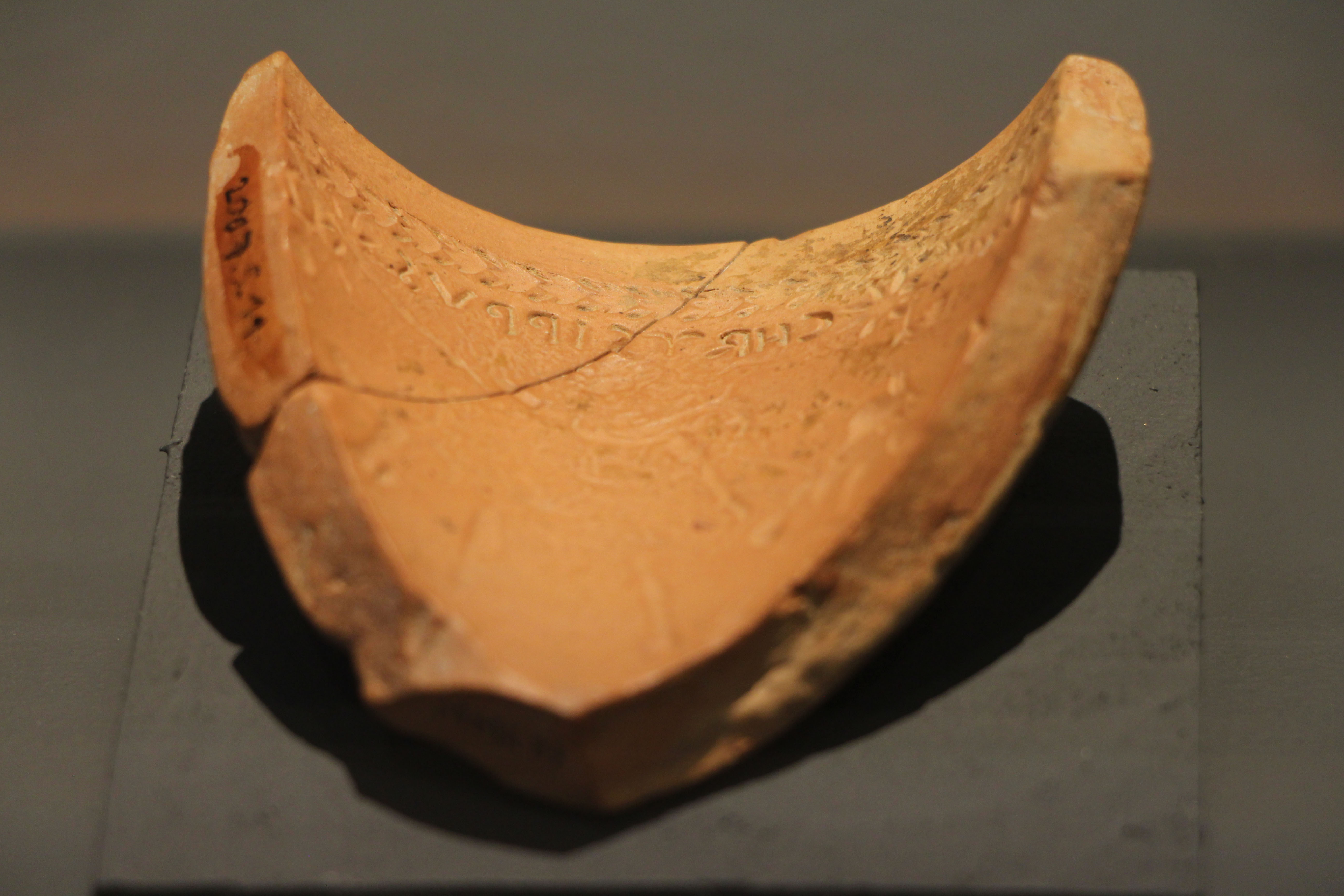 Les productions céramiques lyonnaises à l'époque de la naissance de l'empereur romain Claude : fragment de moule, atelier de la Muette, 1er arrondissement.